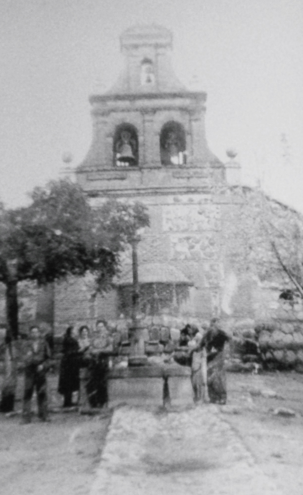 Fuente (hoy desaparecida) de la Plaza de Recesvinto de Guadamur (Toledo). Al fondo, espadaña de la iglesia de Santa María Magdalena, siglo XVI. Foto de colección particular.